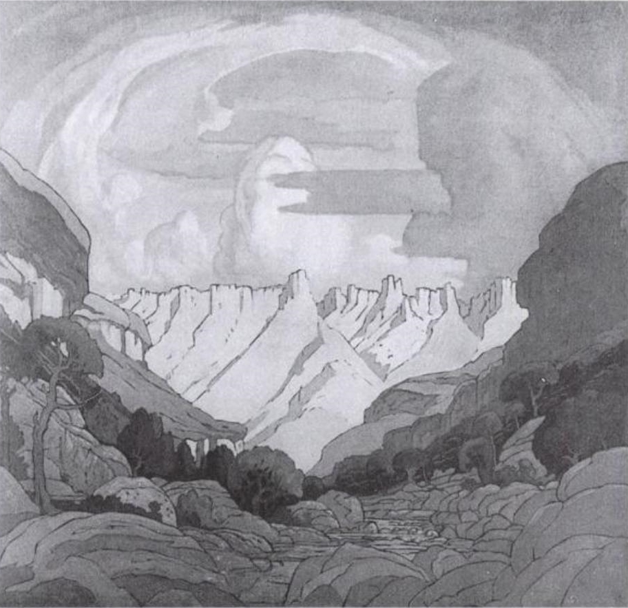 Mont-au-Sorces deur Pierneef. Deel van 'n muurskildery wat oorspronklik vir die Johannesburgse stasie geskep is.